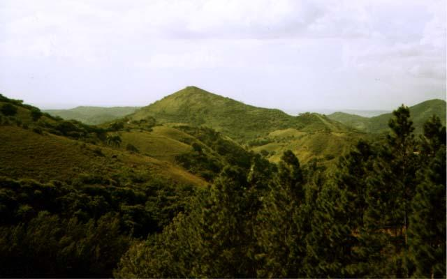 Lear escambray